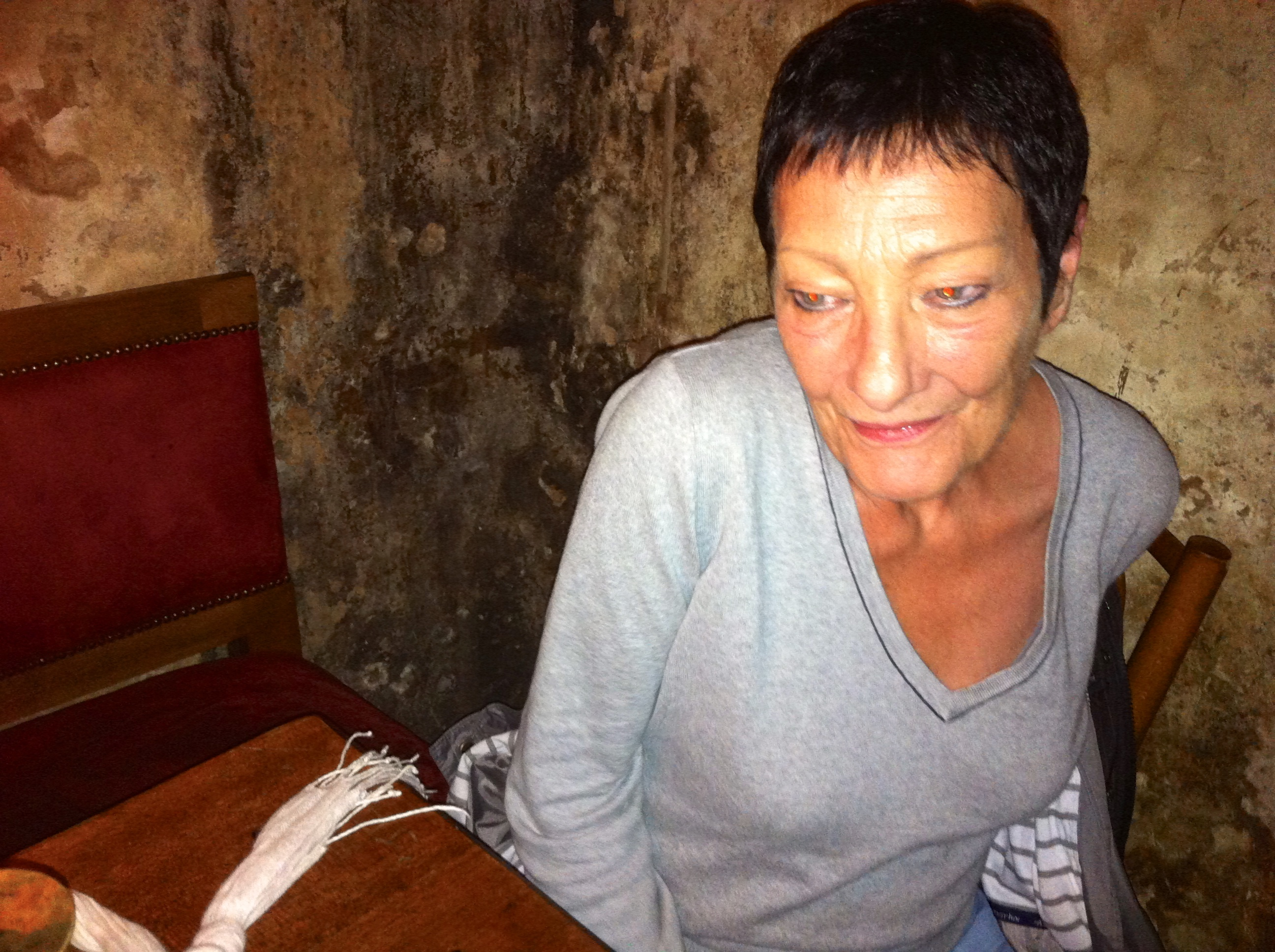 Chez Georges